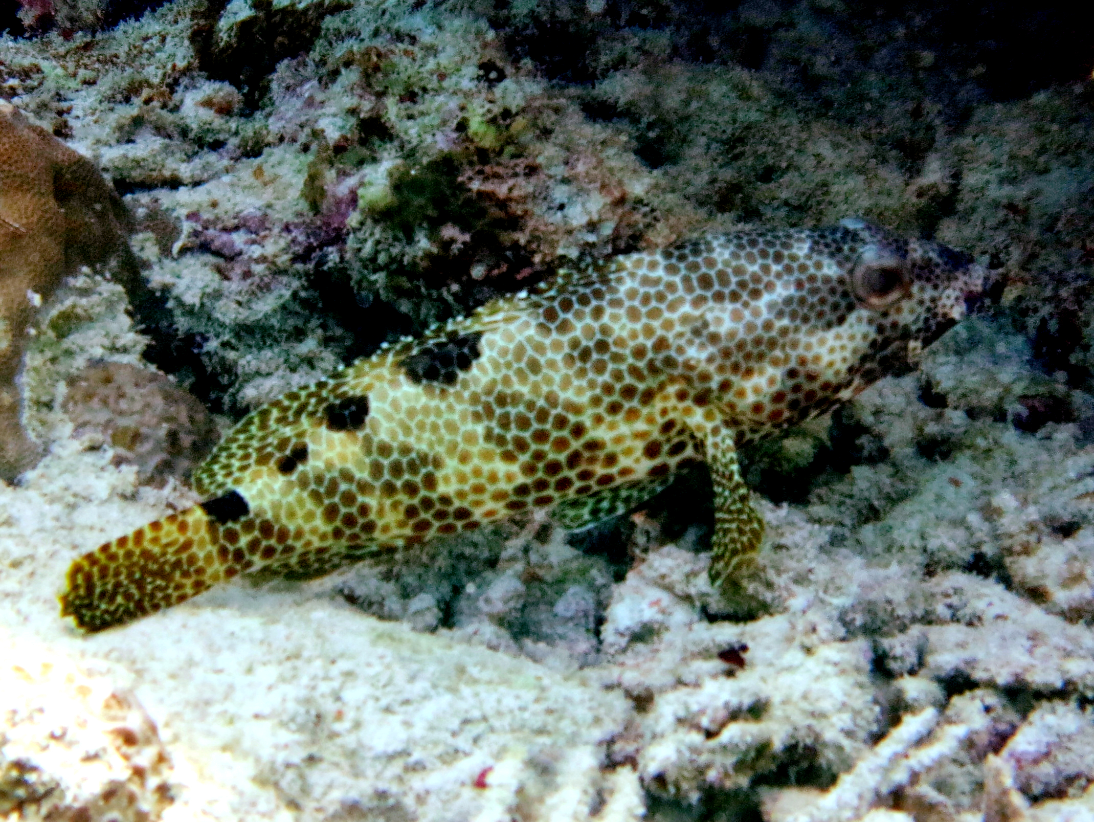 Un mérou à quatre selles (Epinephelus spilotoceps) aux Maldives (Thiladhoo, atoll de Baa).